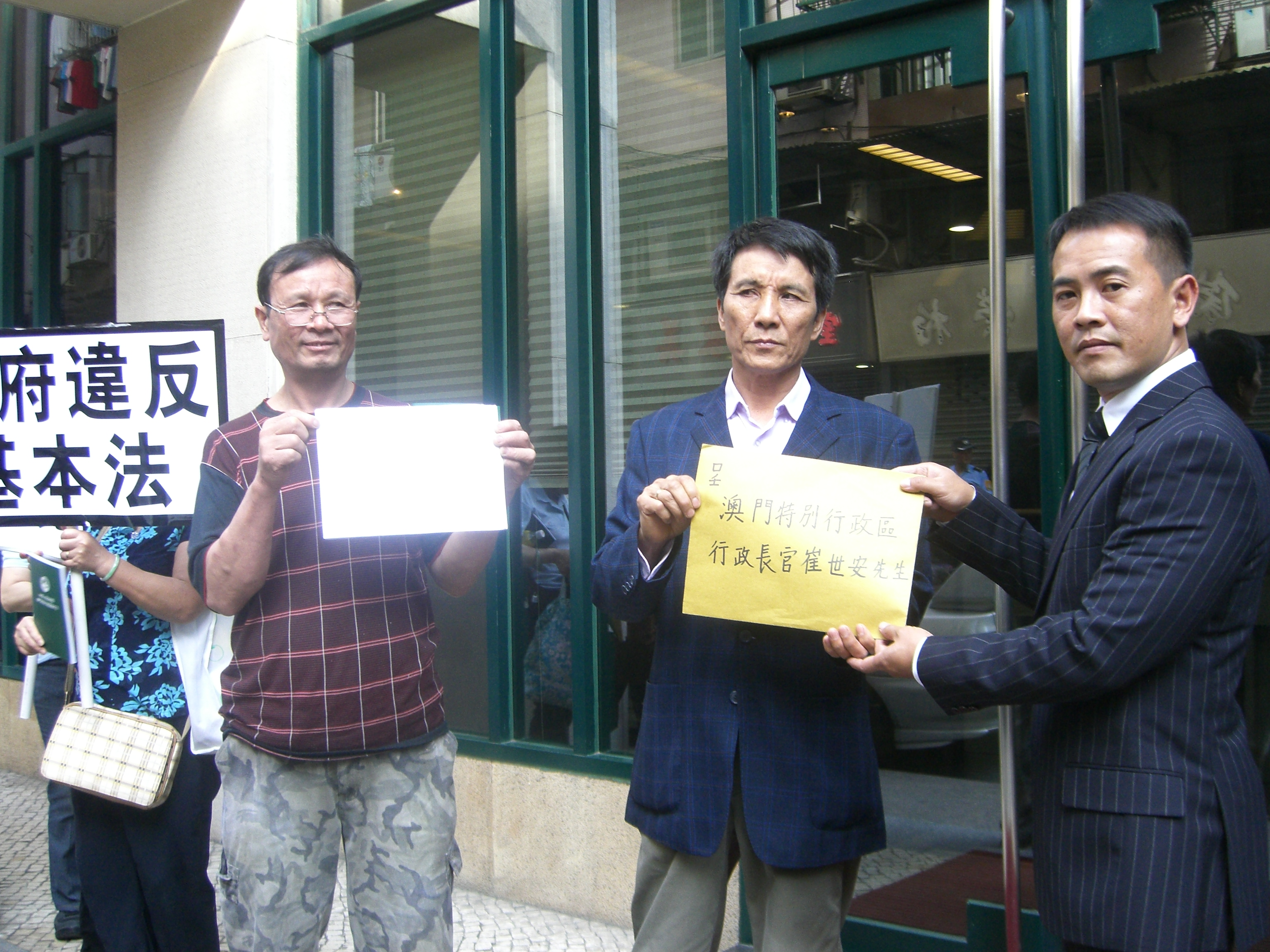 2010年澳門勞動節遊行